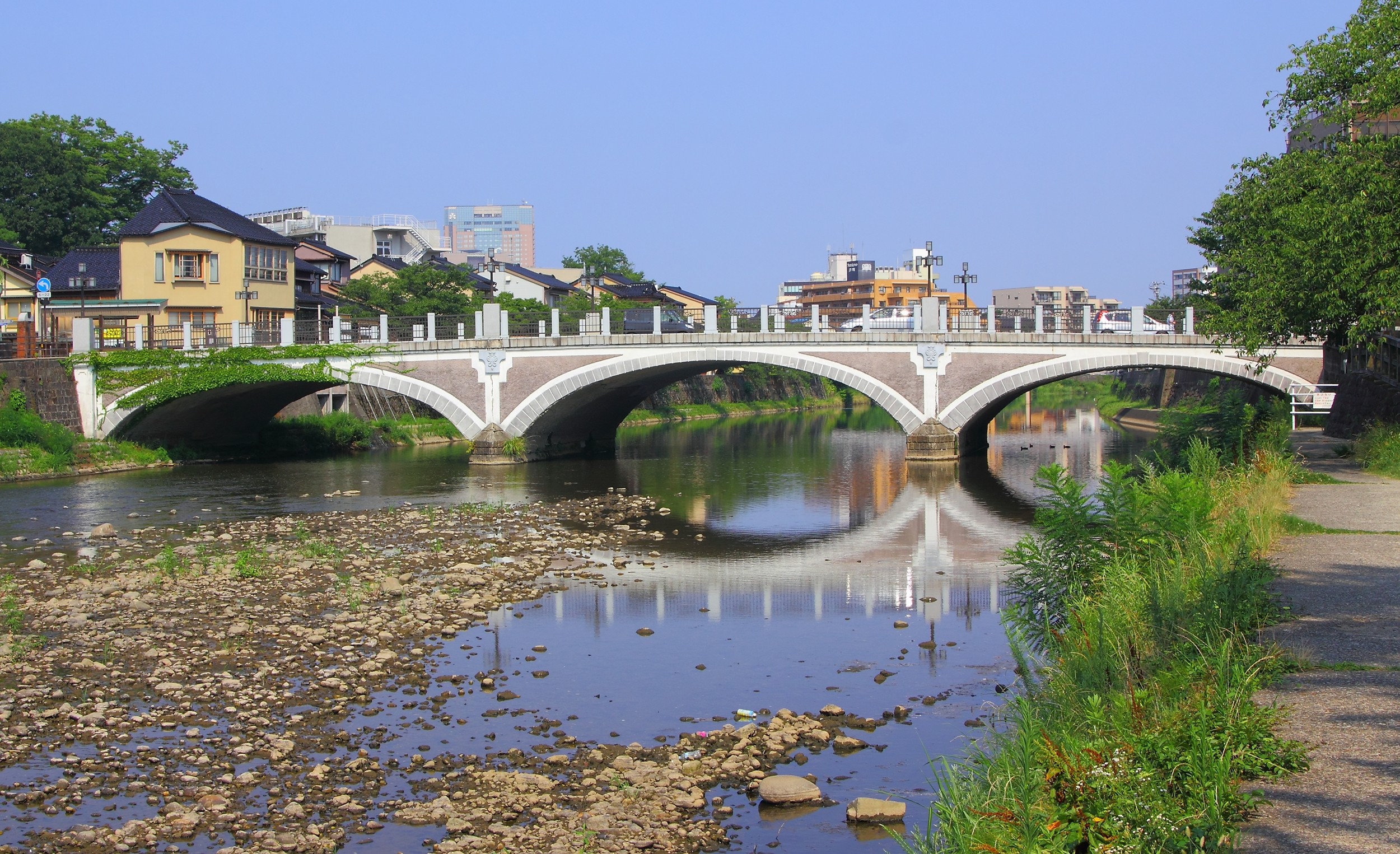 浅野川大橋（国の有形文化財）、石川県金沢市